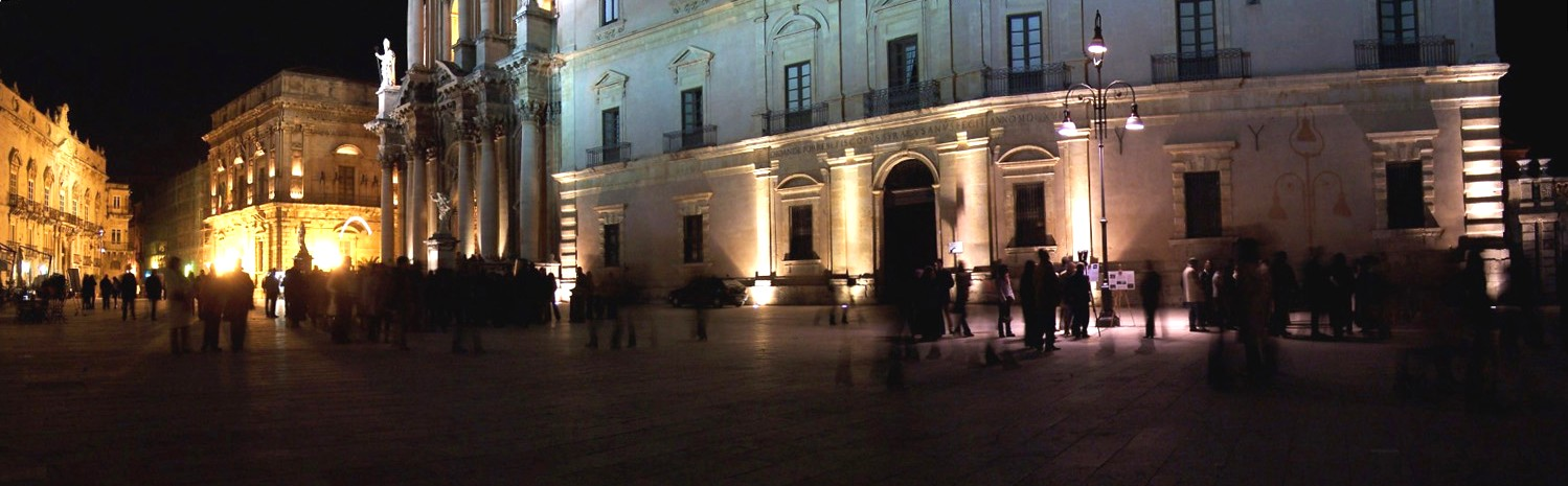 Piazza Duomo a Siracusa